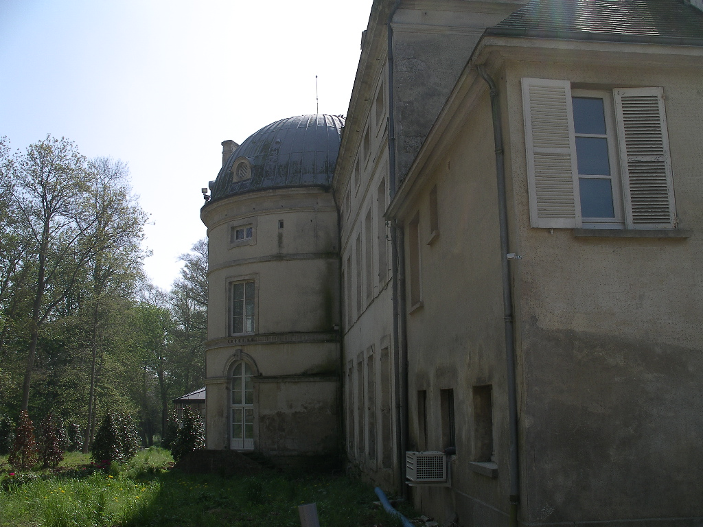 Chateau Assy à Ouilly-le-Tesson (Calvados)